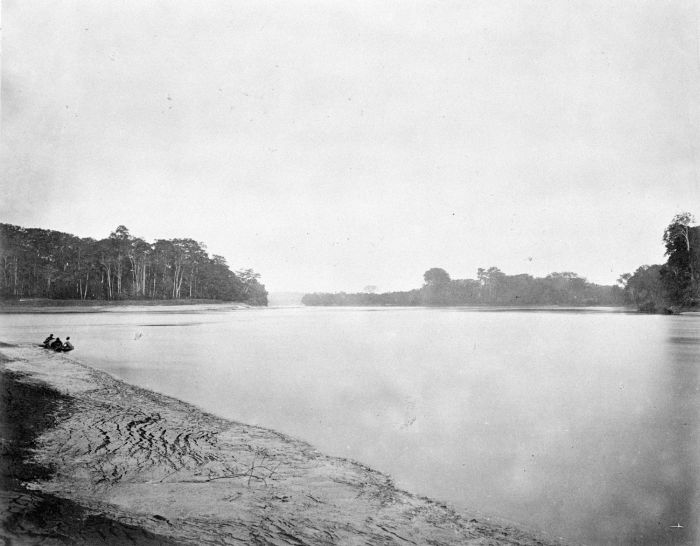 Foto. Deze foto is gemaakt tijdens de Sumatra Expeditie van 1877-1879. Landschappen en oudheden uit Djambi.. Samenvloeiing van de Tembesirivier en de Batang Hari, in het district Rawas, Sumatra